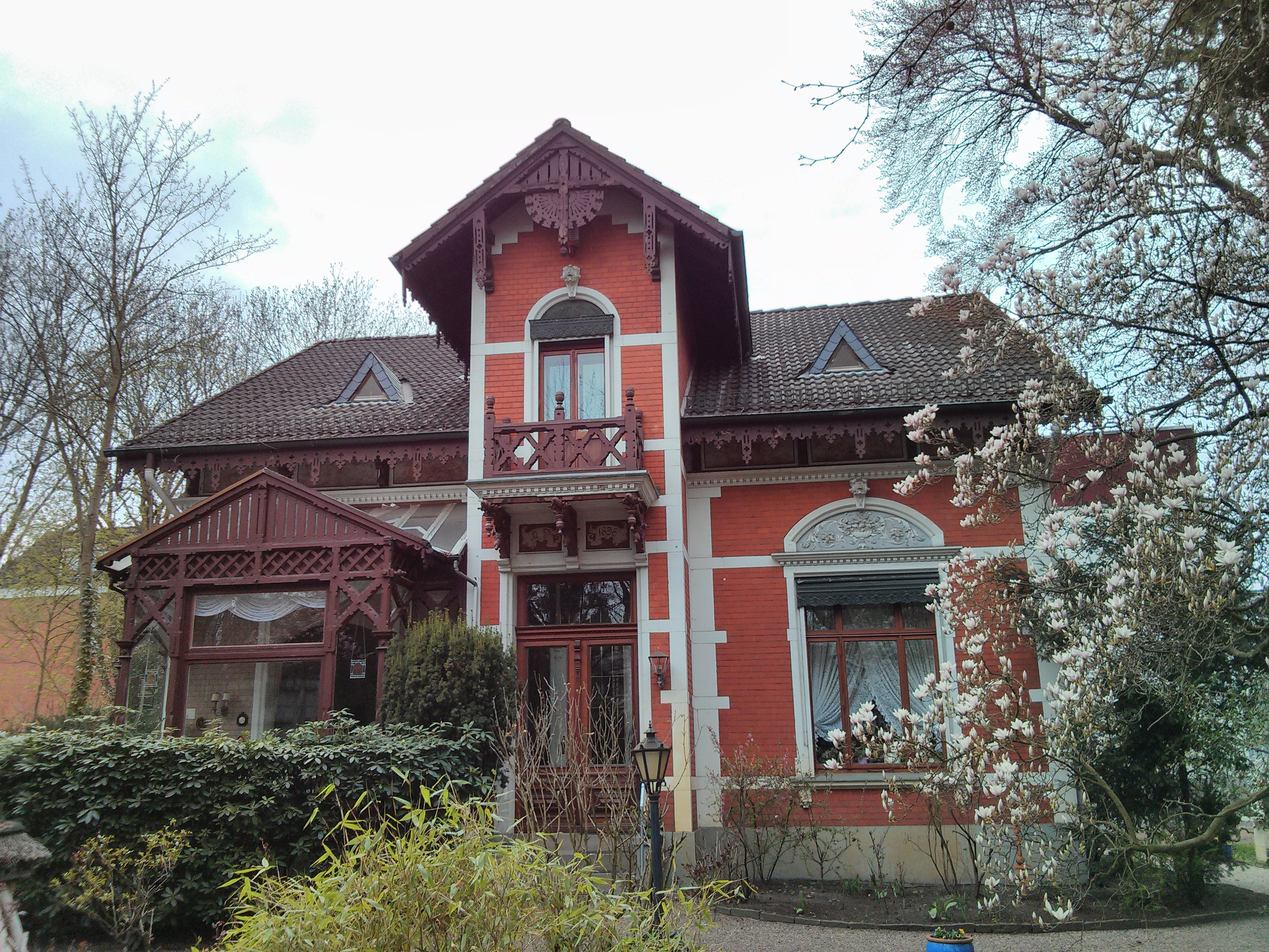 Haus Klatte in Bremen, Schwachhauser Heerstraße 170 Das abgebildete Objekt ist ein geschütztes Kulturdenkmal in der Freien Hansestadt Bremen, mit der Nr. 1125 beim Landesamt für Denkmalpflege registriert.